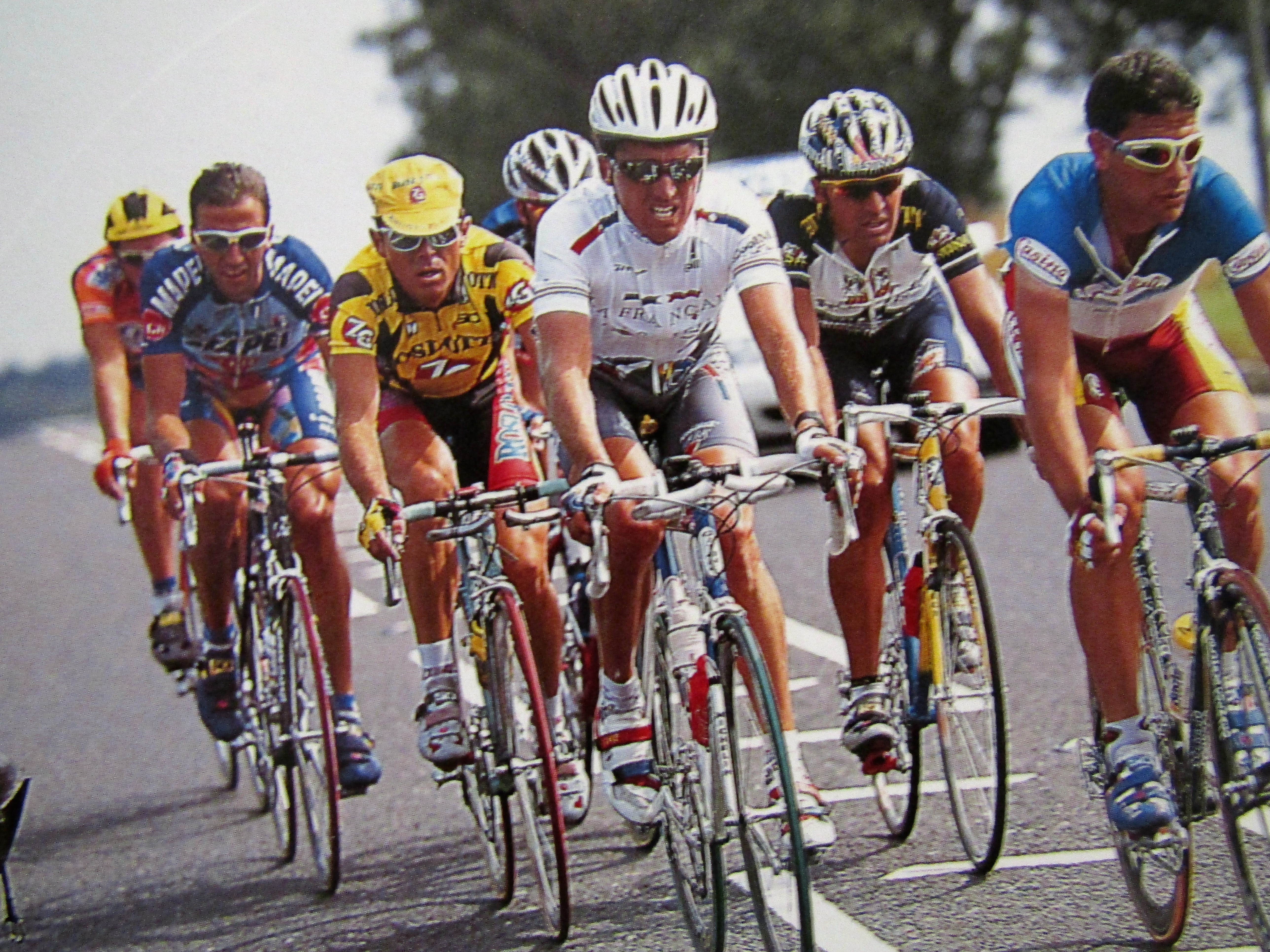 Heulot éhappé au sommet de White Hill (Grande-Bretagne) en compagnie du nouveau champion de France Stéphane Barthe, Tafi, Robin, Ferrigato, Vatteroni et Bortolami.